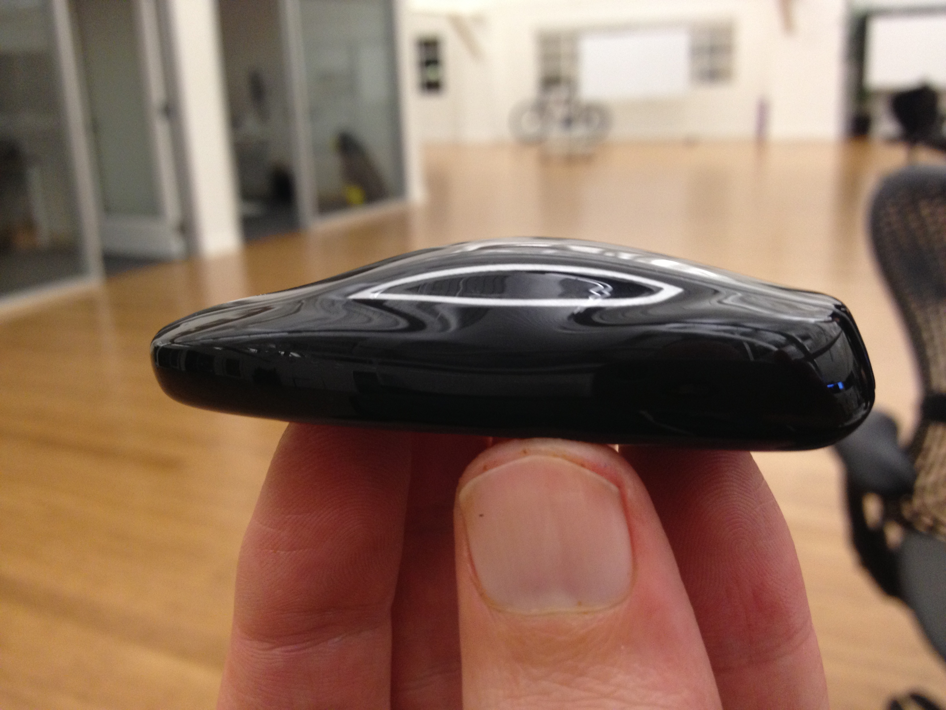 Tesla Model S Key